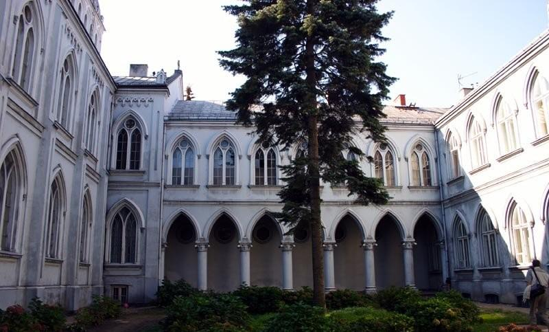 Polska